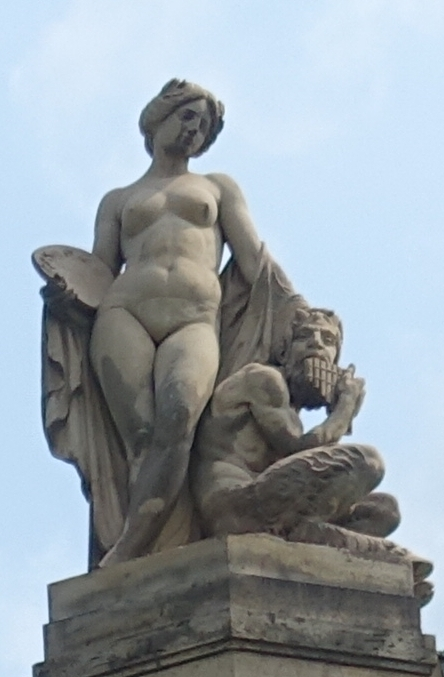 Allegorie der Malerei von Adolf Fremd, 10. Attikafigur (von links) auf dem Portikus des Großen Hauses der Staatstheater Stuttgart, 1912.